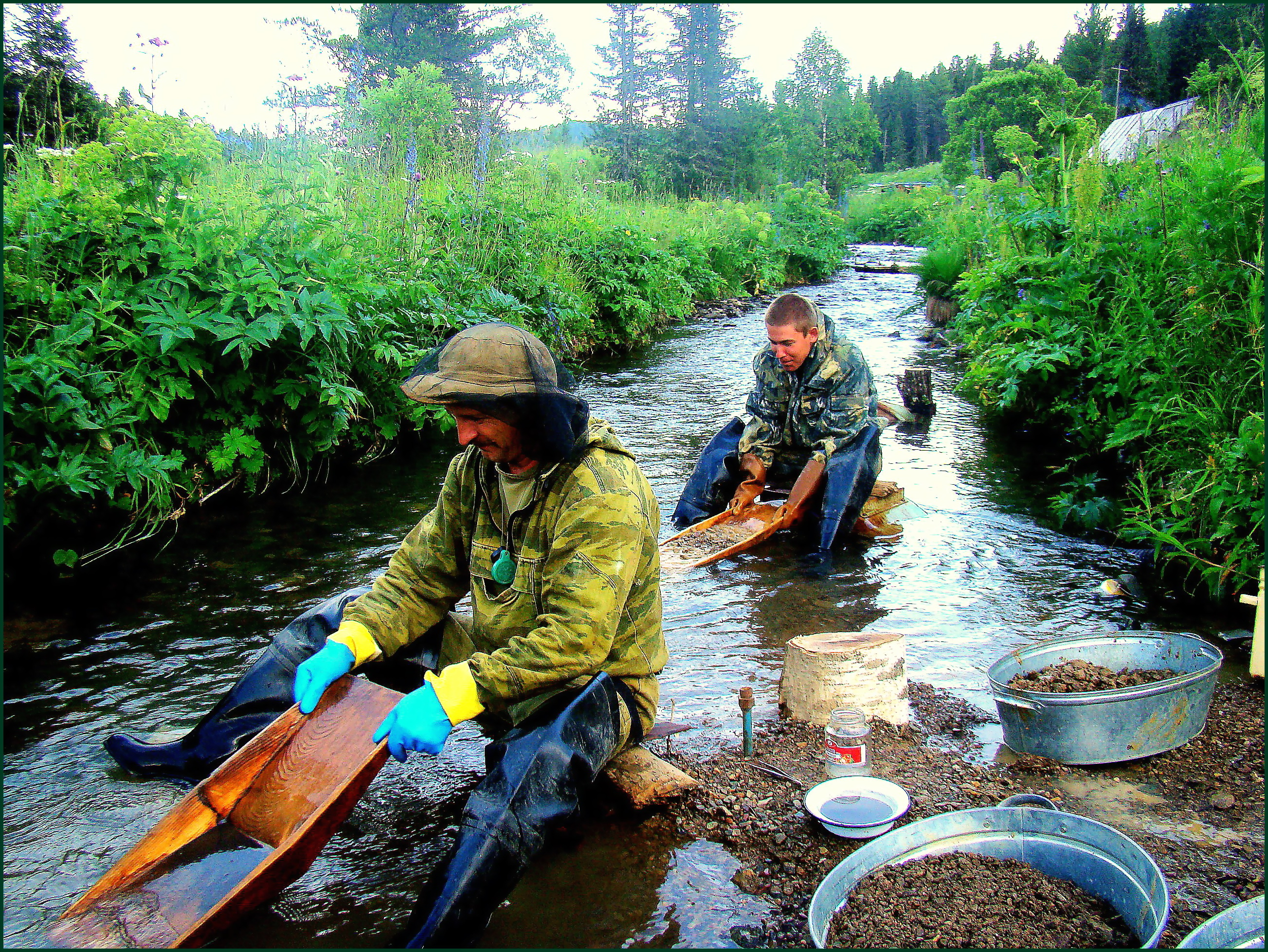 Доводка шлихов на горном ручье в лотках. Август, 2009, Горный Алтай. Фото А.Н. Рудого.